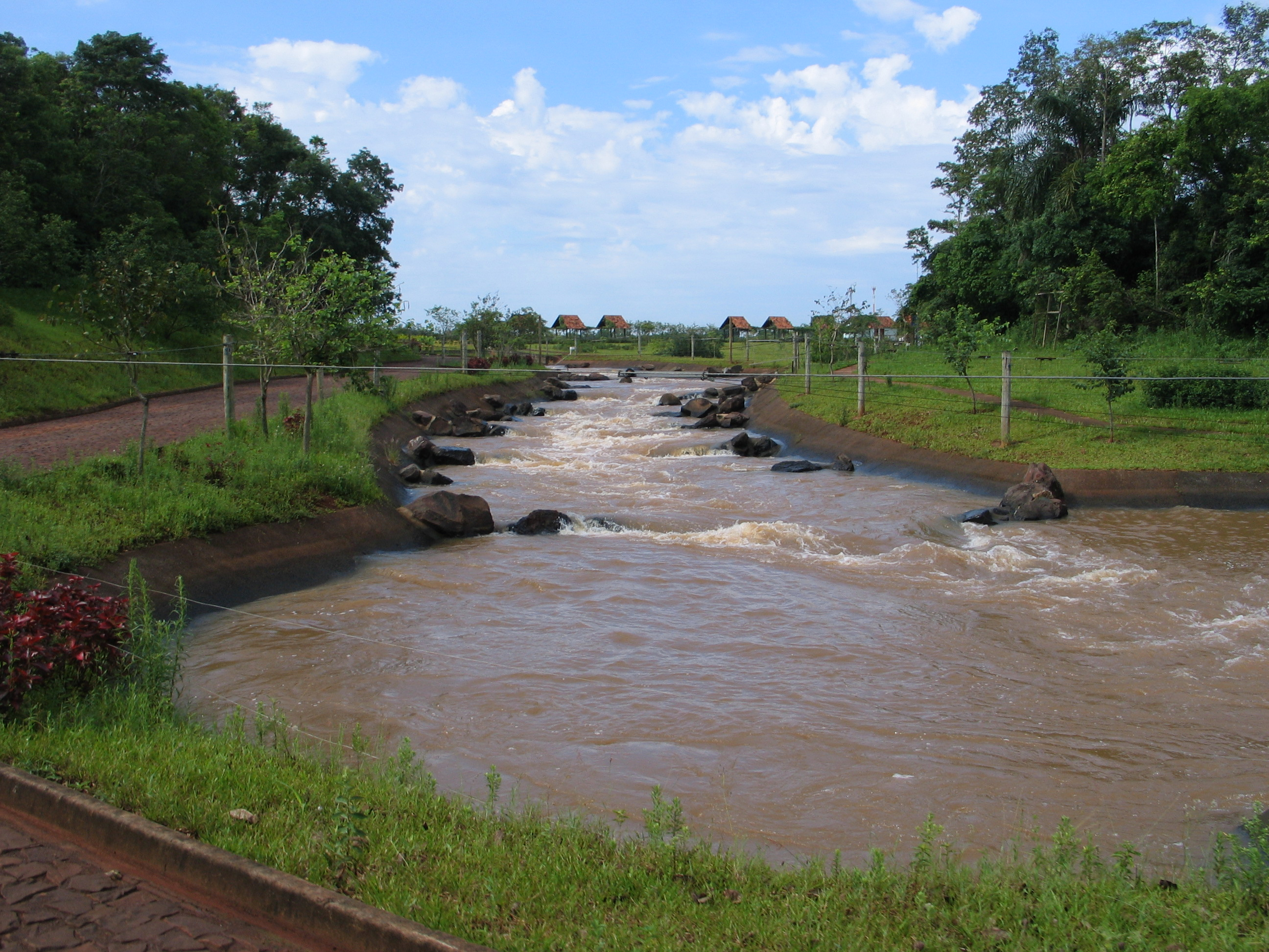 תעלה המקשרת בין אגם איטייפו ונהר איטייפו מאפשרת לדגים לטפס במעלה הזרם